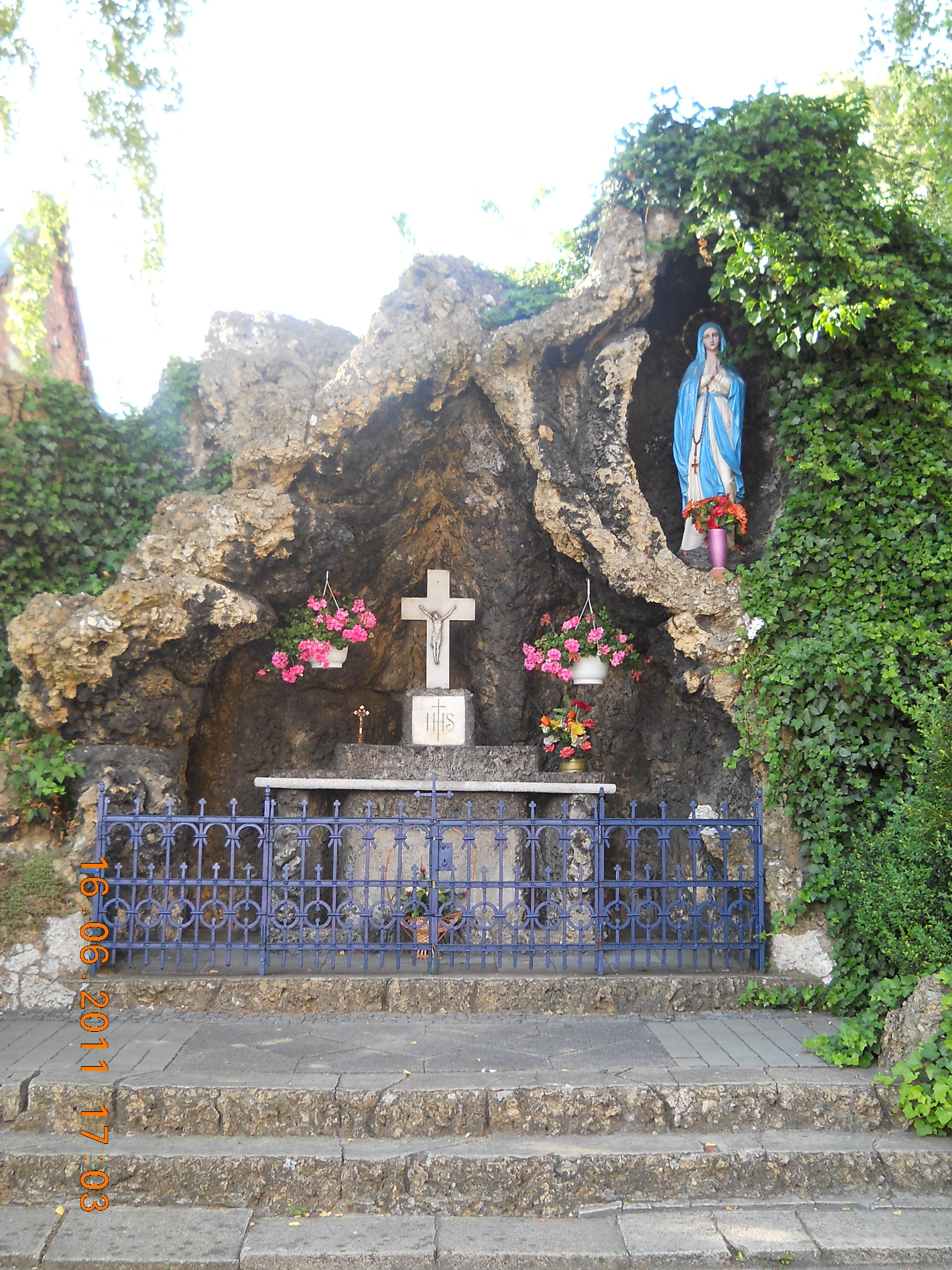 kościół par. p.w. św. Mikołaja Pyskowice, ul. Poniatowskiego